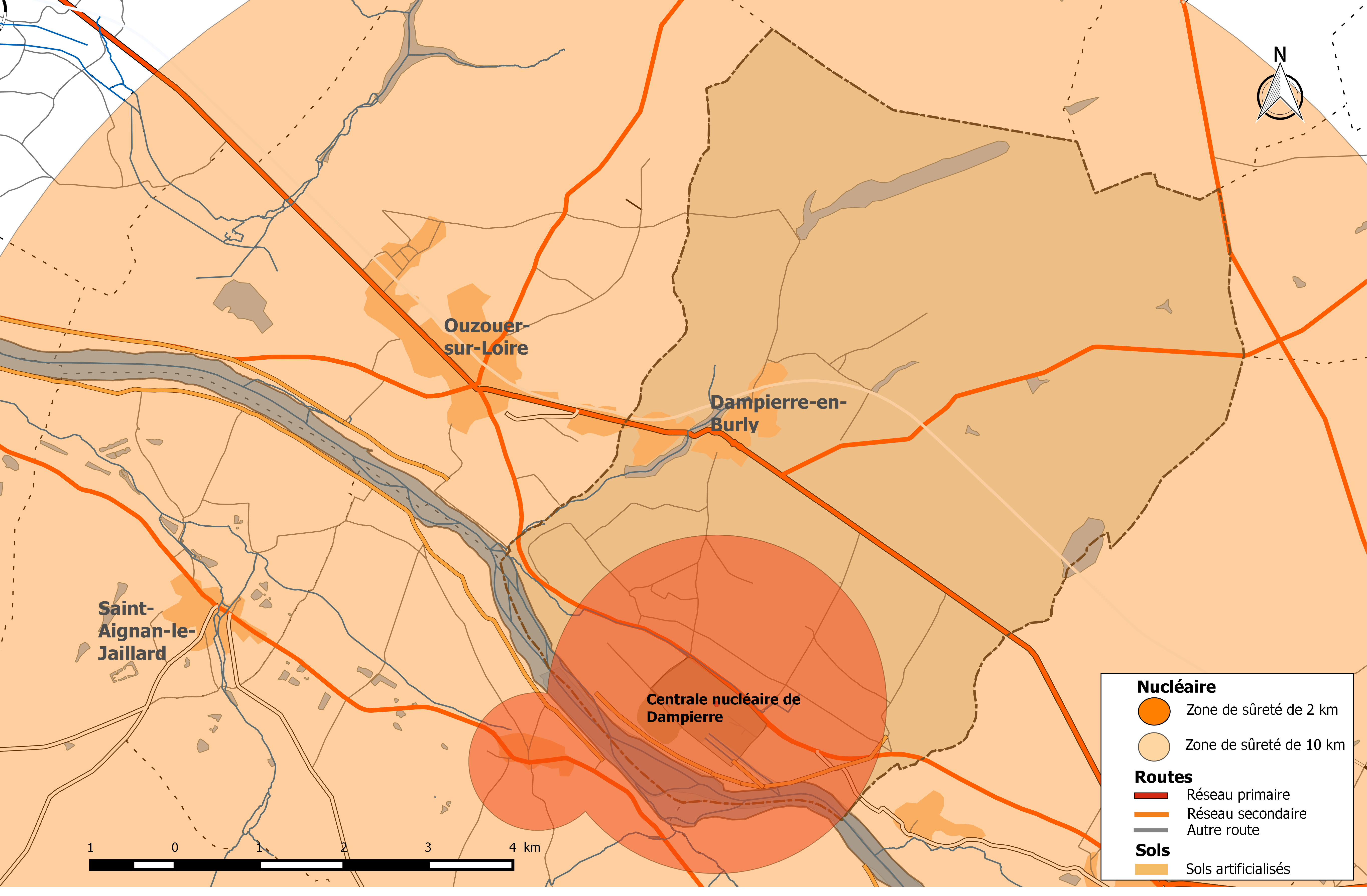 Zones de sûreté 2 km et 10 km autour de la centrale nucléaire de Dampierre - commune de Dampierre-en-Burly